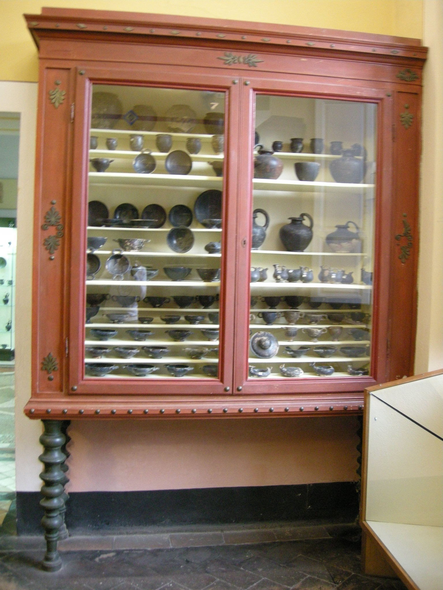 Museo guarnacci, bucchero